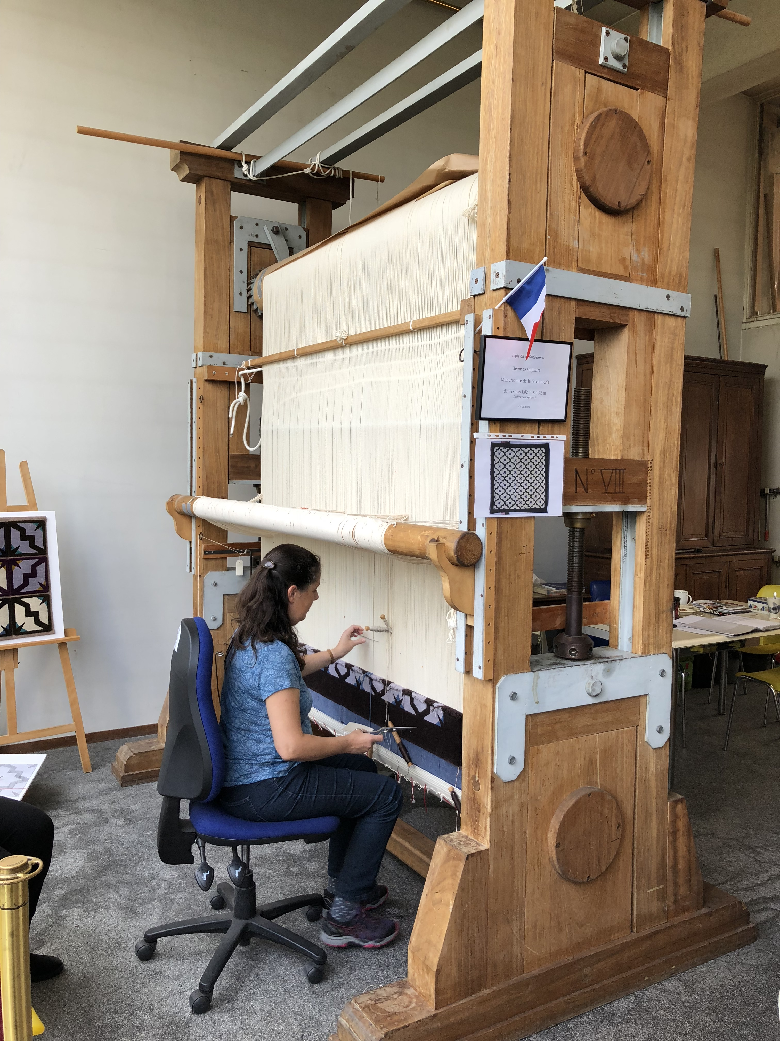 Métier à tisser de haute lisse, technique de la Savonnerie.